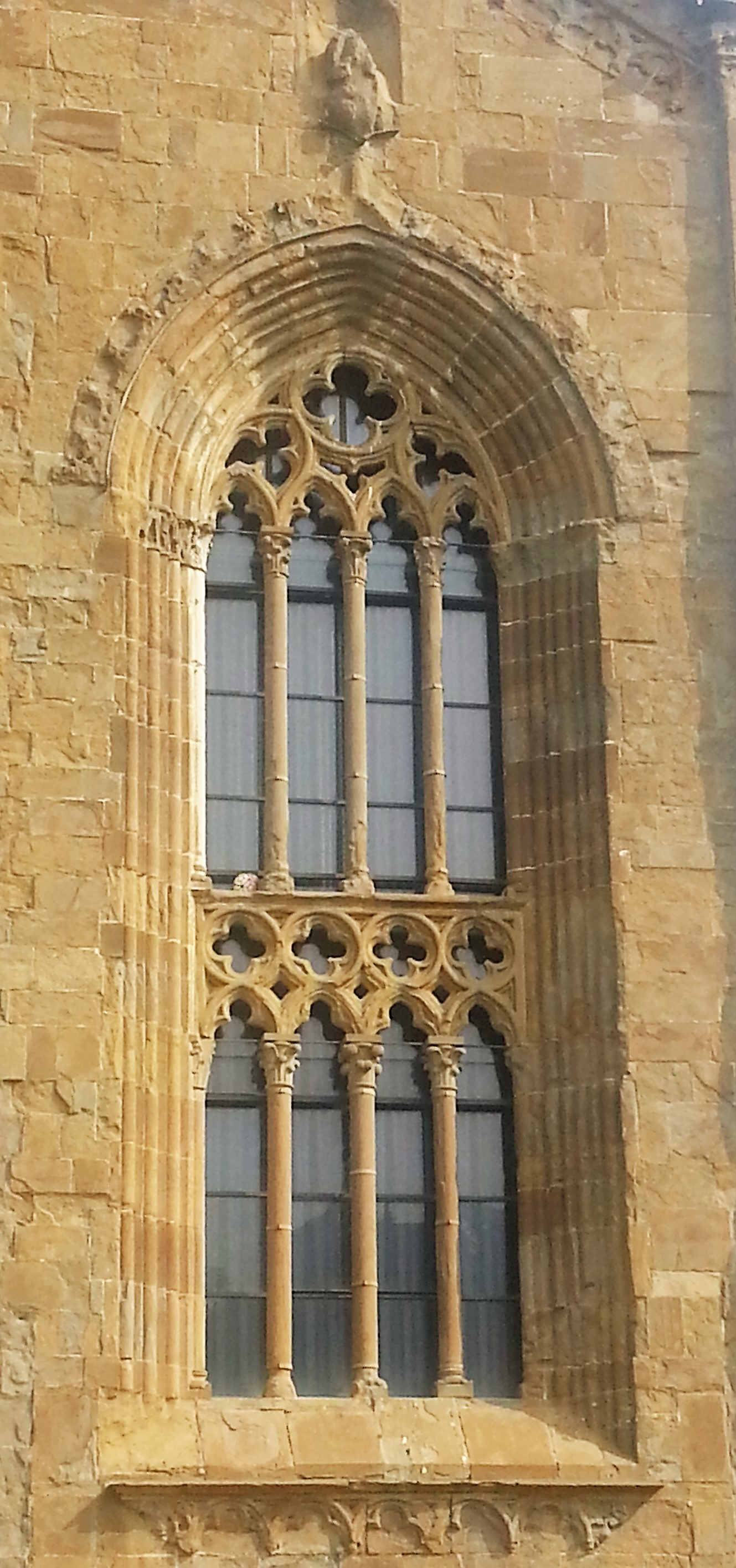 Particolare della facciata anteriore chiesa di Sant'Agostino- finestra con colonnine